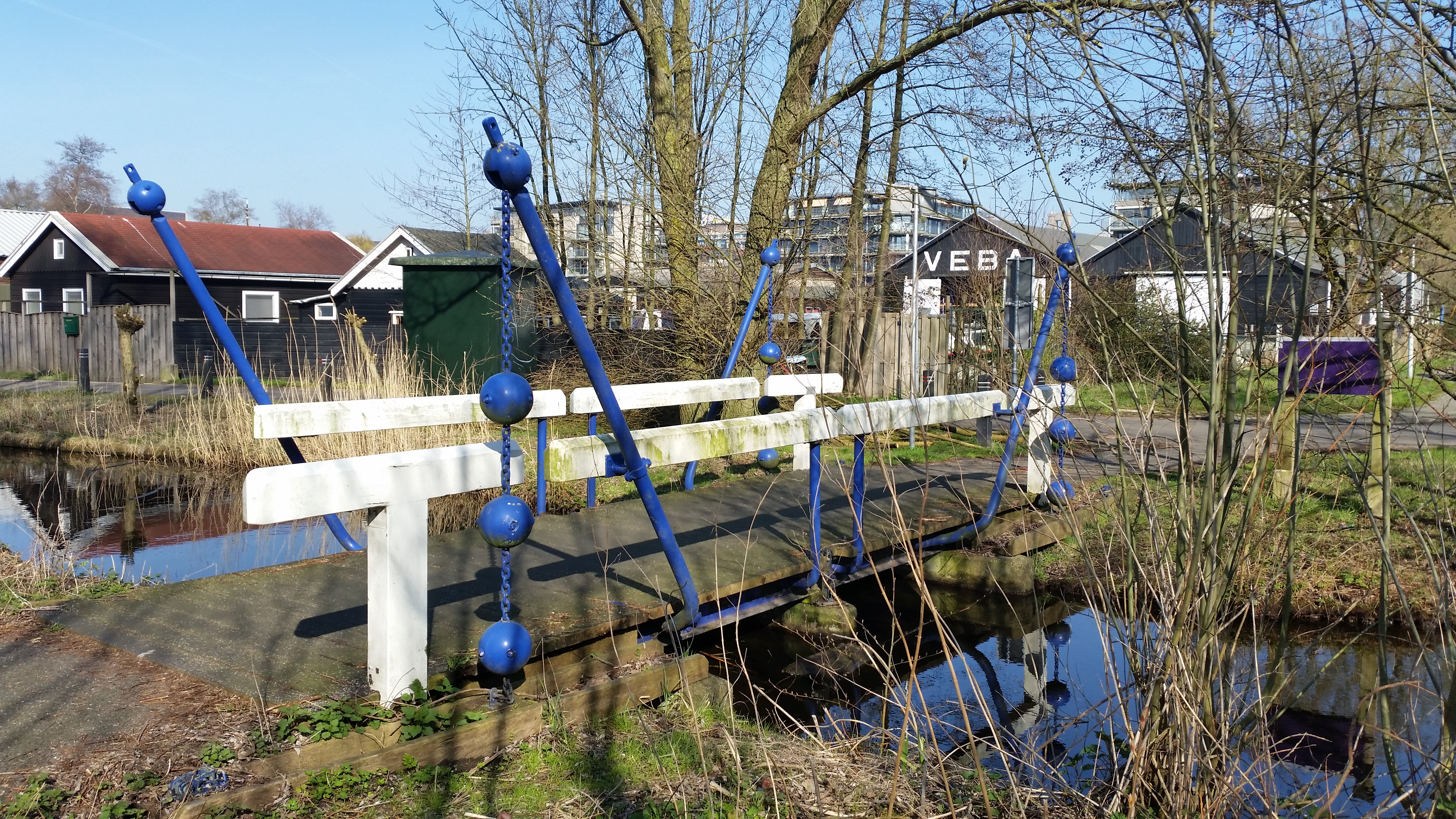 Zijaanzicht van gemankeerd Brug 516 (in Amsterdam) (er ontbreken ballen als contragewicht)